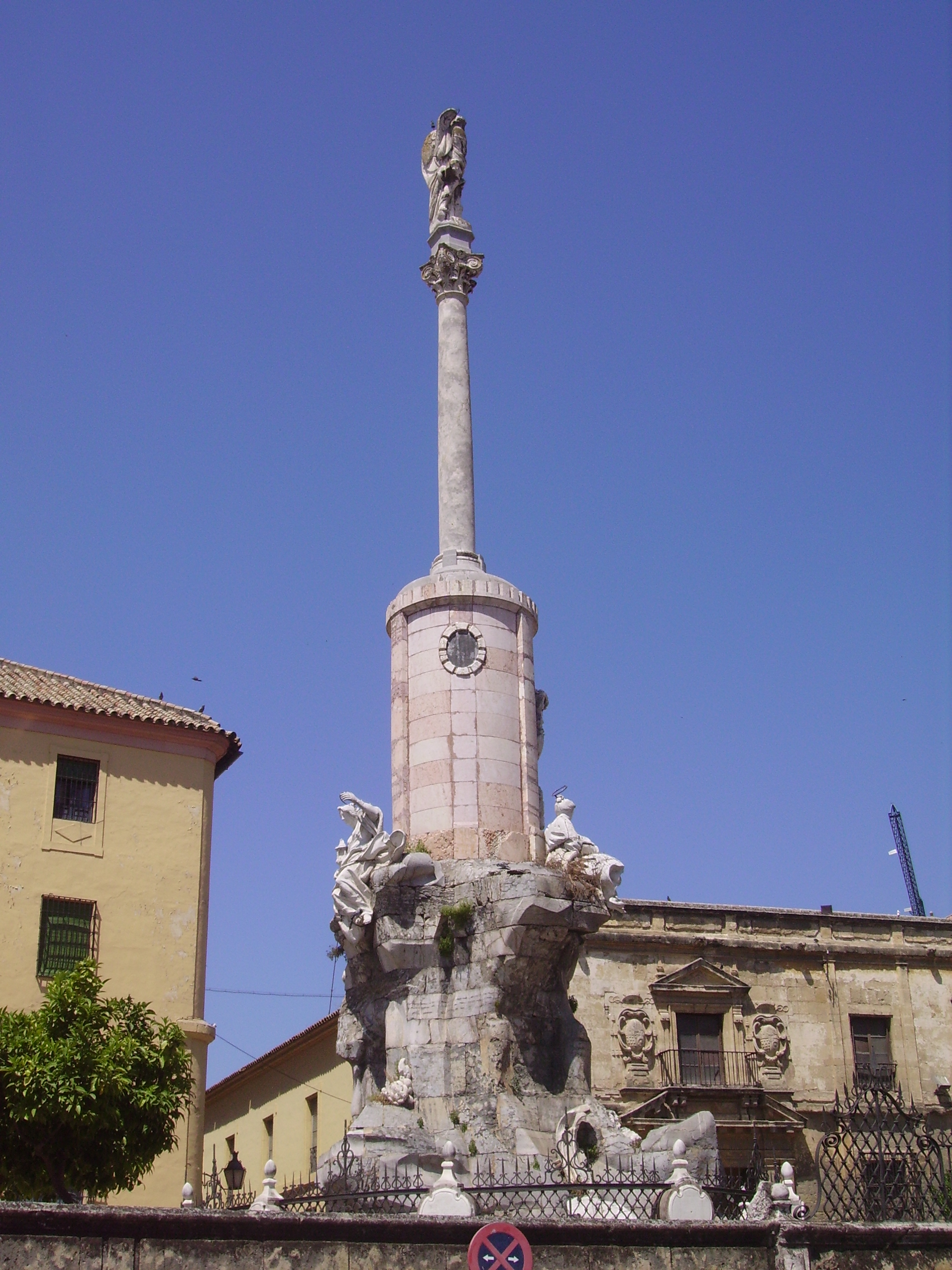 Triunfo de San Rafael de la Puerta del Puente, en Córdoba (España).